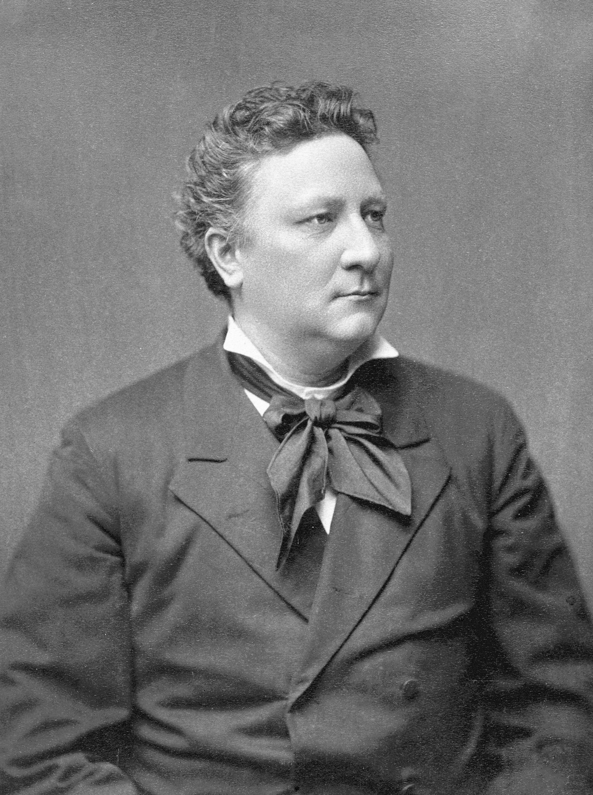 Gustaf Mallander, skådespelare vid Nya teatern 1879